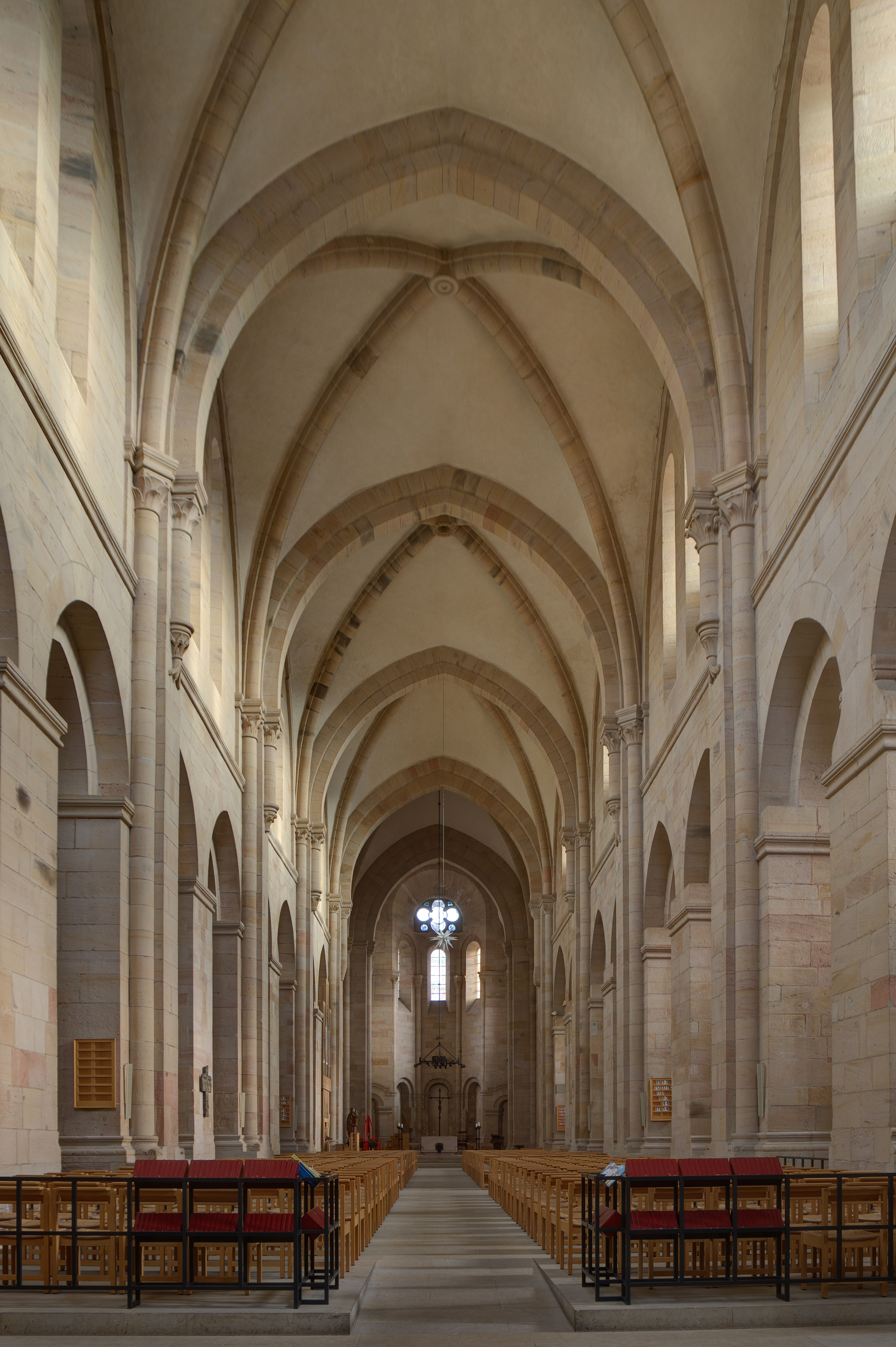 Otterberg, Abteikirche